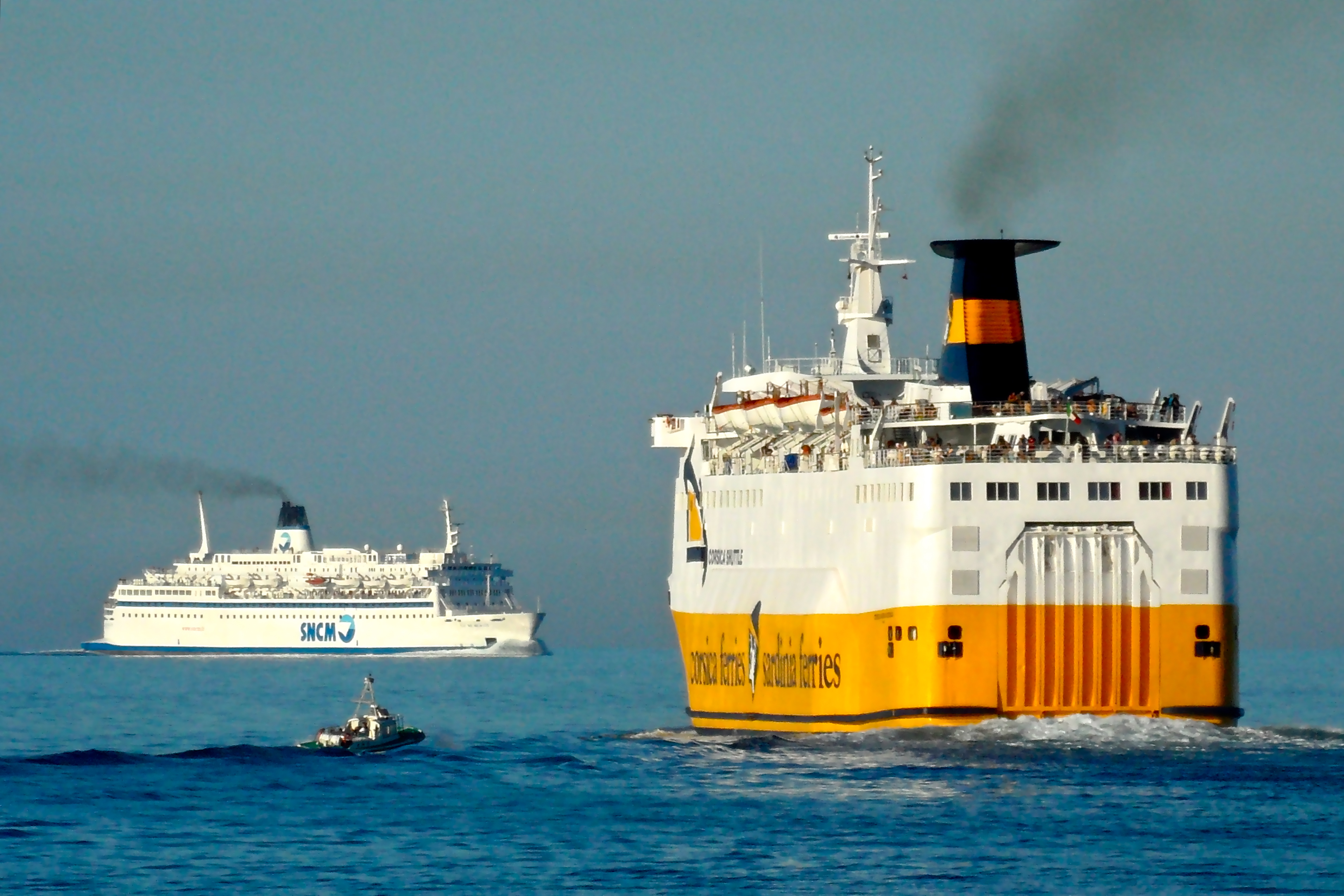 l'Île de Beauté (SNCM) et le Corsica Marina Seconda (Corsica ferries)